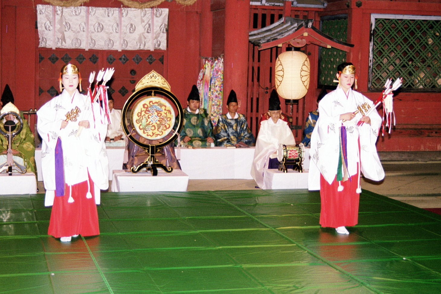 早神楽(浪速神楽) Naniwa-Kagura(miko dance)